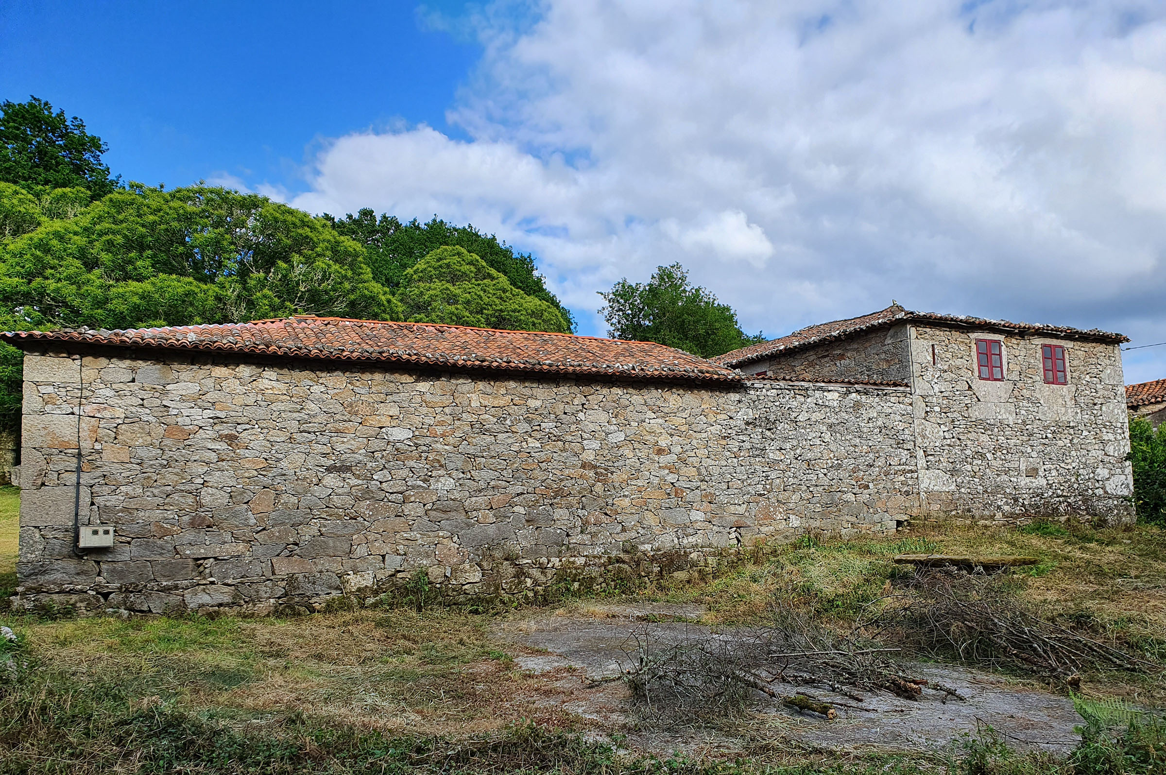 Conxunto de vivenda e palleira unida, formando un curral interior. Dentro del hai forno e pozo. Ubicada no lugar de Alvidrón de Outeiro, parroquia de San Martiño de Vilapoupre (Antas de Ulla)